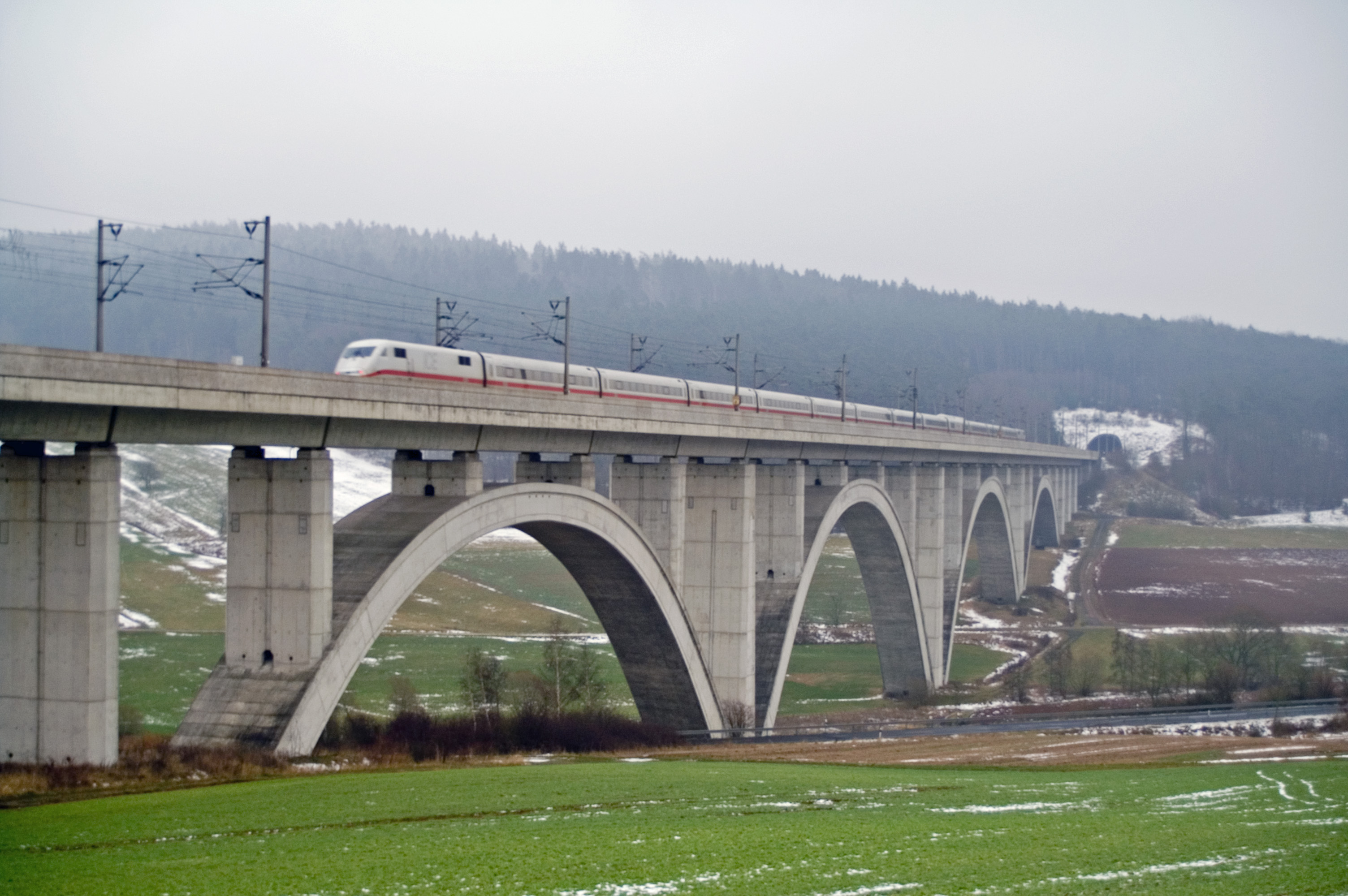 Germany Wälsebachtalbrücke Railroad Hannover/Würzburg ICE 1